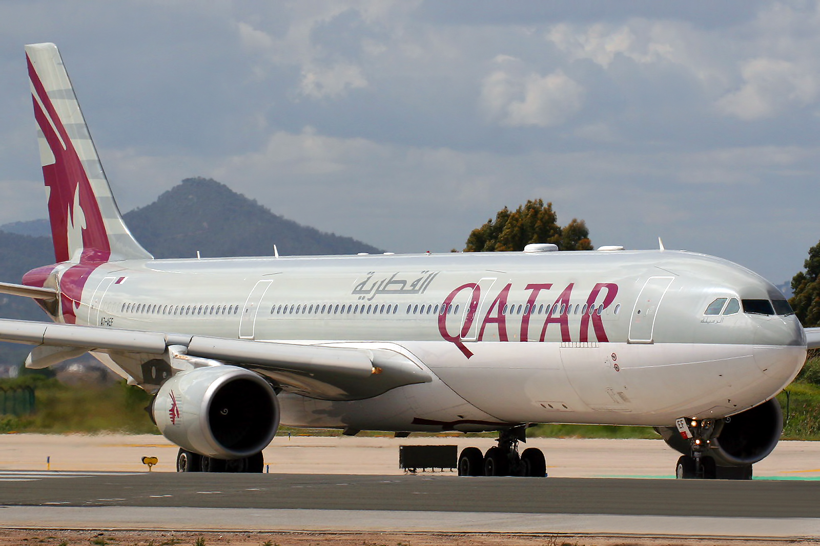 Barcelona El Prat (LEBL/BCN) Airport